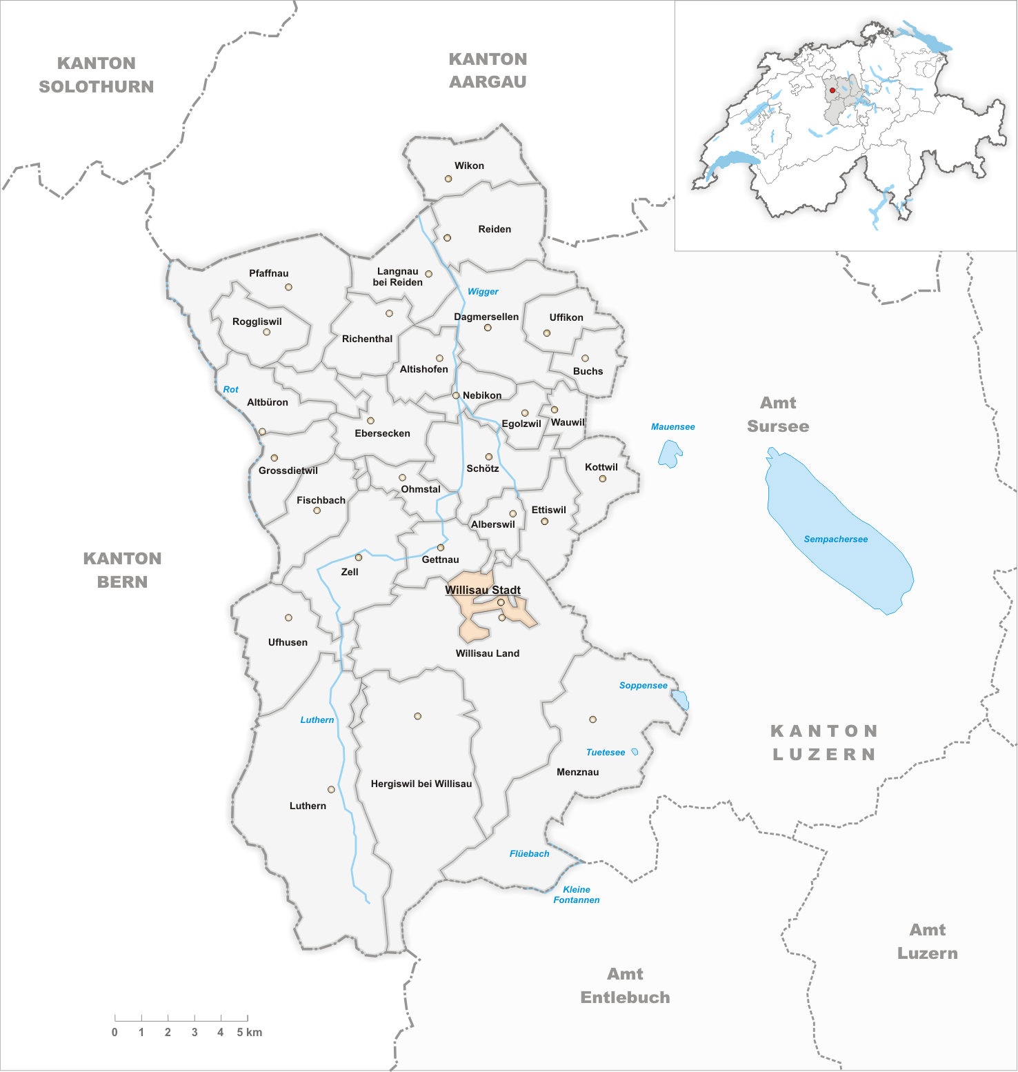 Municipality Willisau Stadt Artist: Tschubby